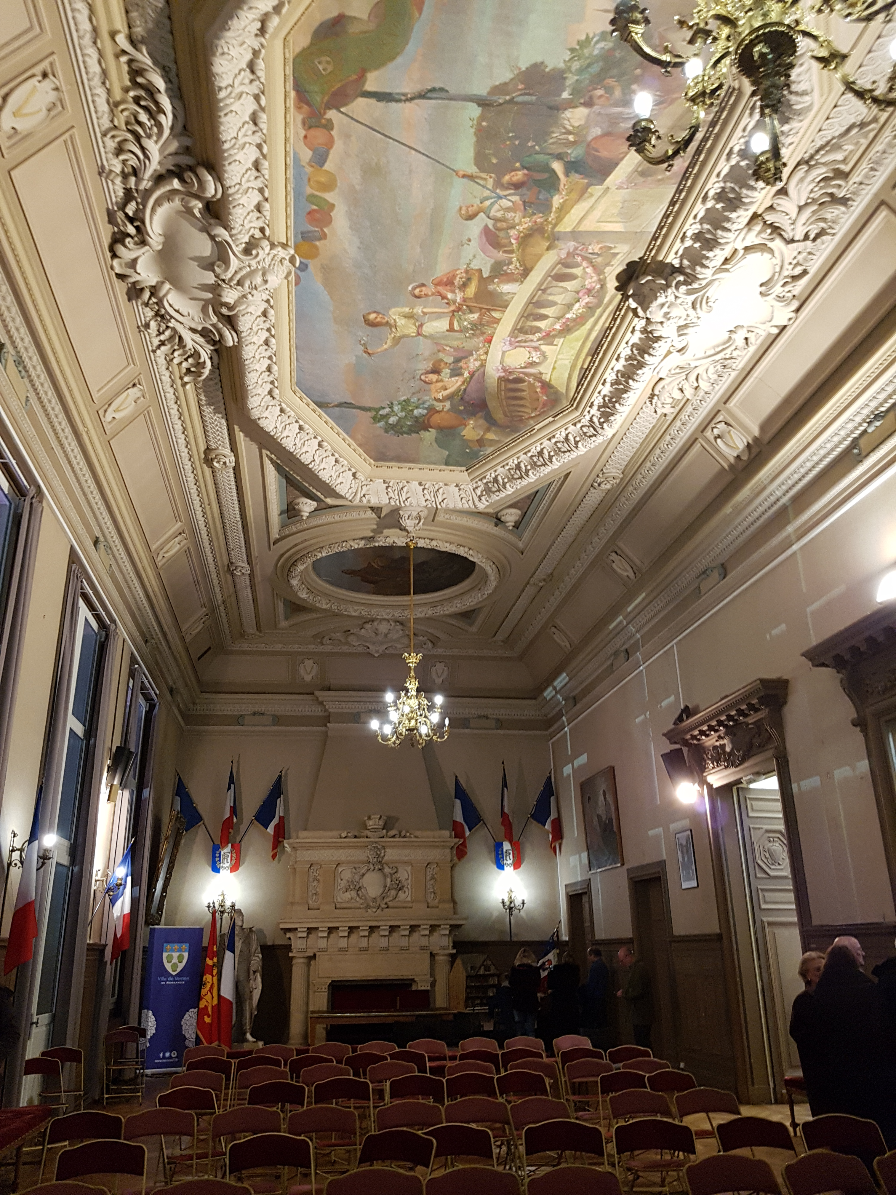 Mairie de Vernon. Salle des mariages.